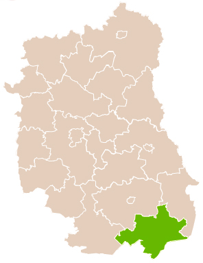 Map of Tomaszów Lubelski county, Lublin voivodship Mapa powiatu tomaszowskiego, województwo lubelskie